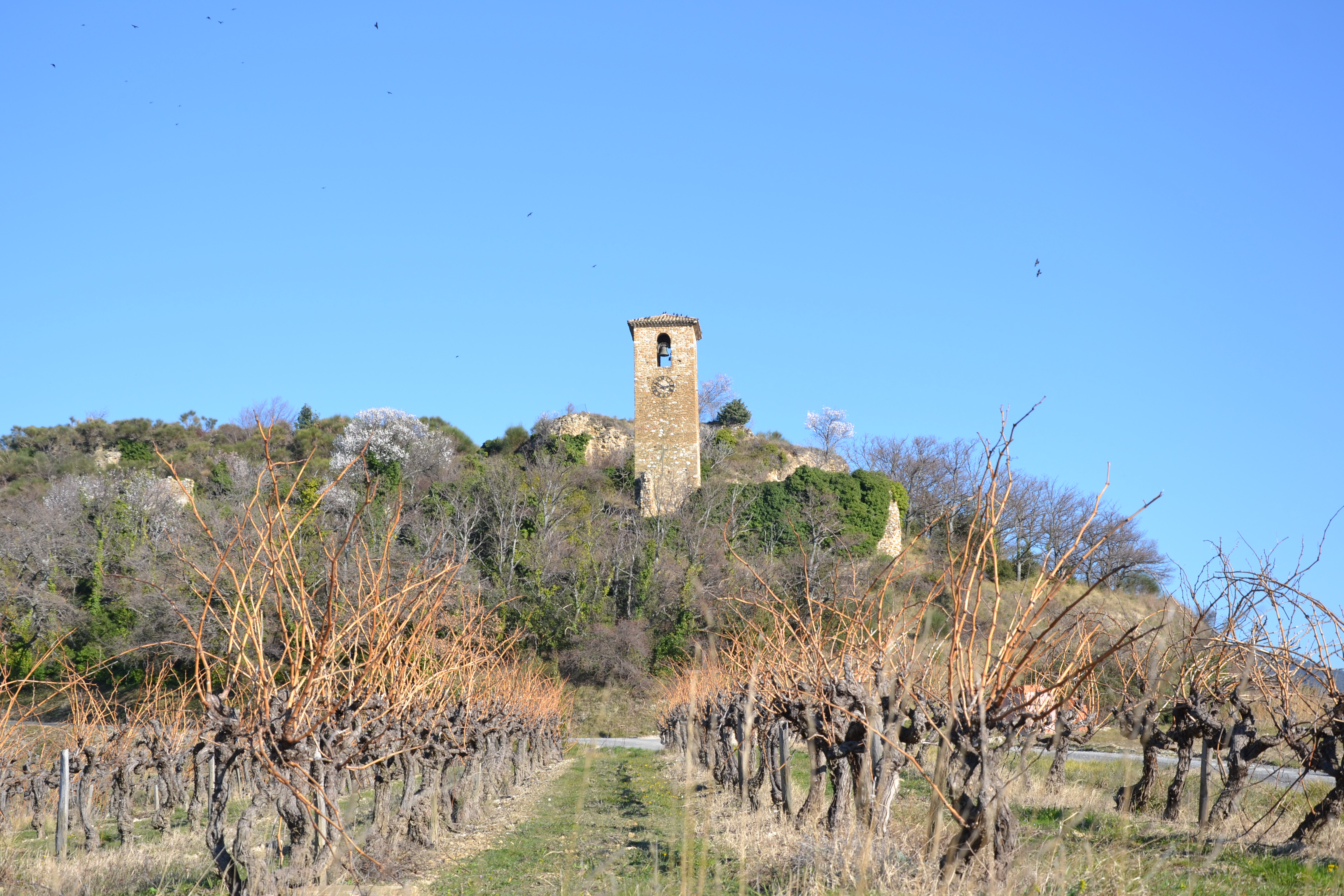 Beffroi de l'ancien village de Piégon